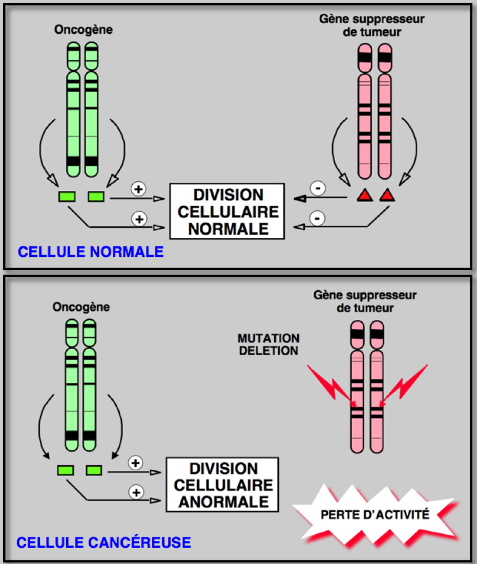 gene suppresseur de tumeur